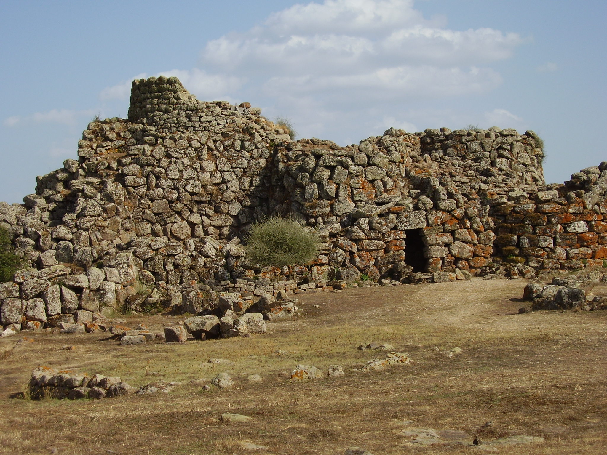 Nuraghe Arrubiu - MIBAC This is a photo of a monument which is part of cultural heritage of Italy.